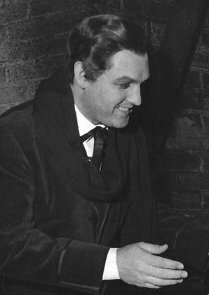 Rolf Björling in La Bohème at Malmö stadsteater